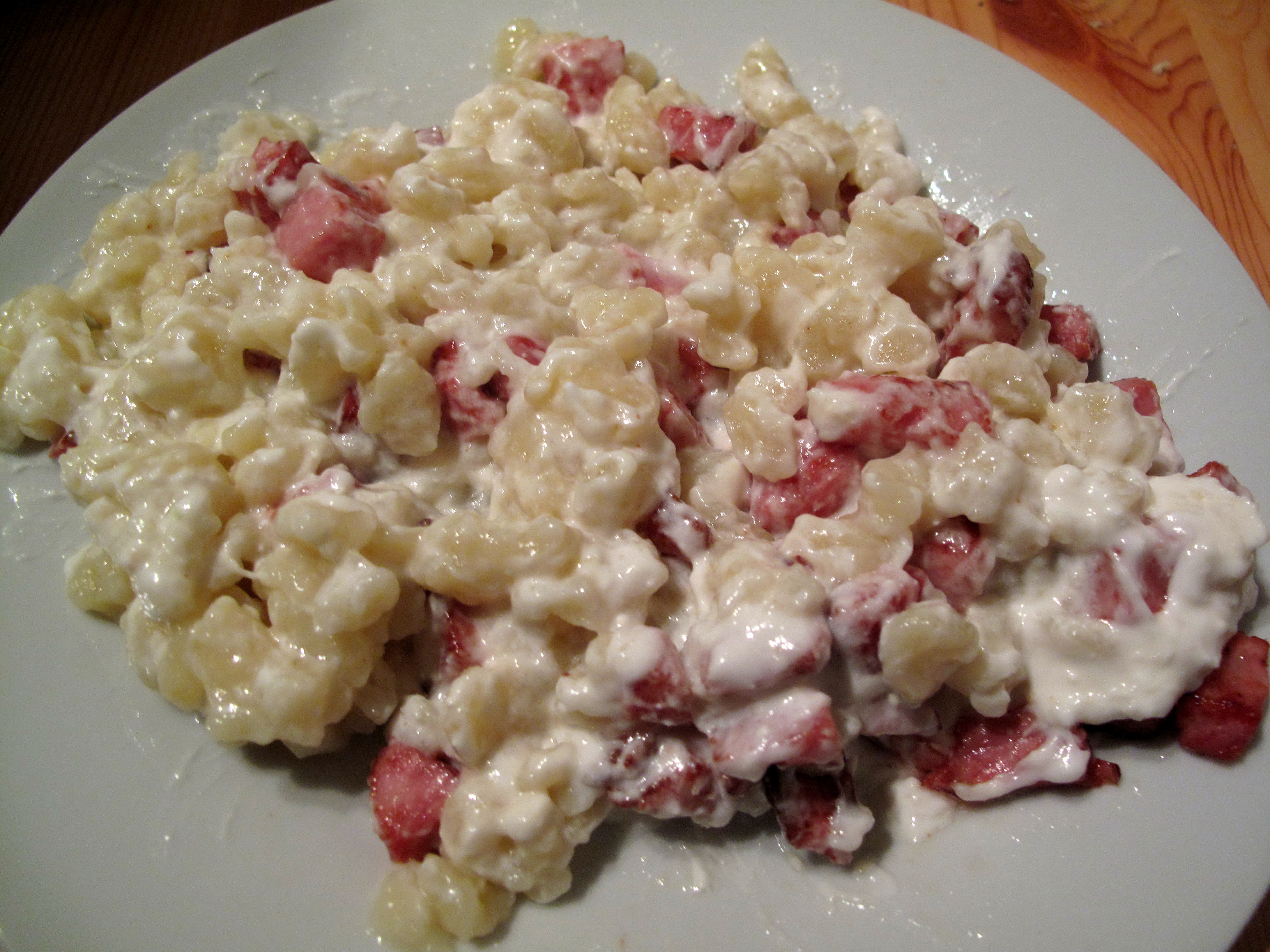 Halušky s brynzou a uzeninou